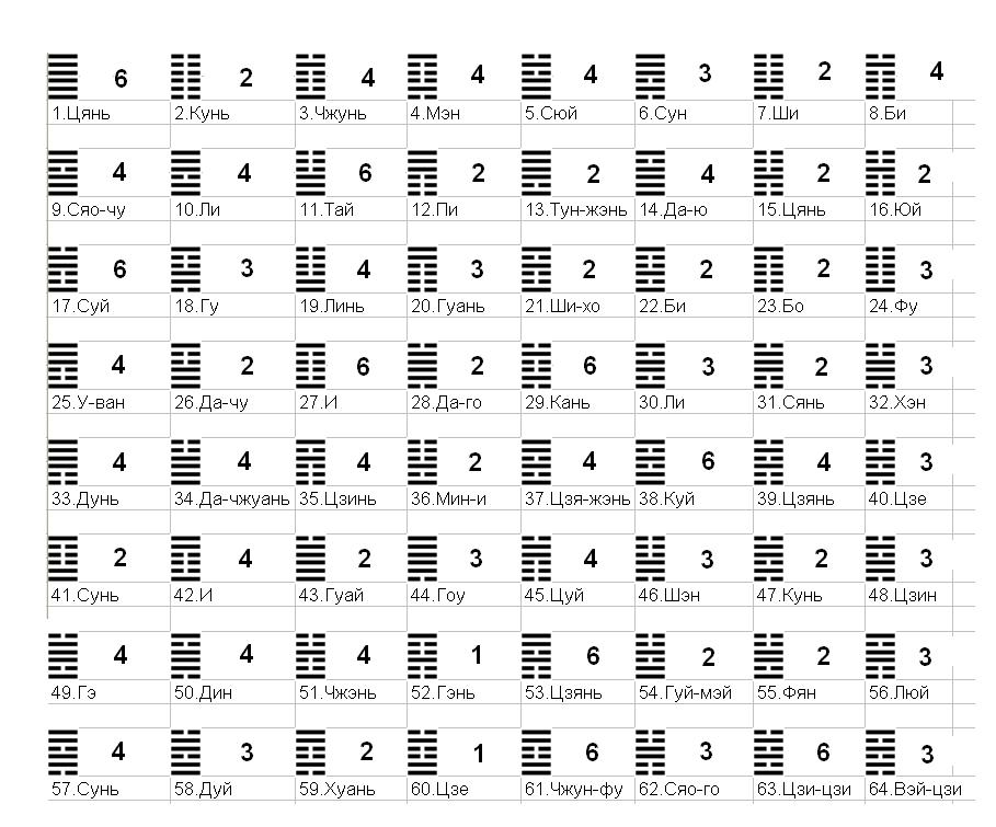 Последовательность Вэнь Вана с указанием количества изменяющихся черт при переходе от одной гексаграммы к следующей.